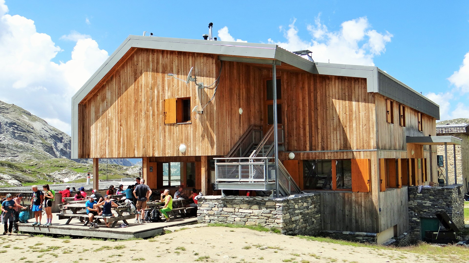 Nouveau refuge du col de la Vanoise